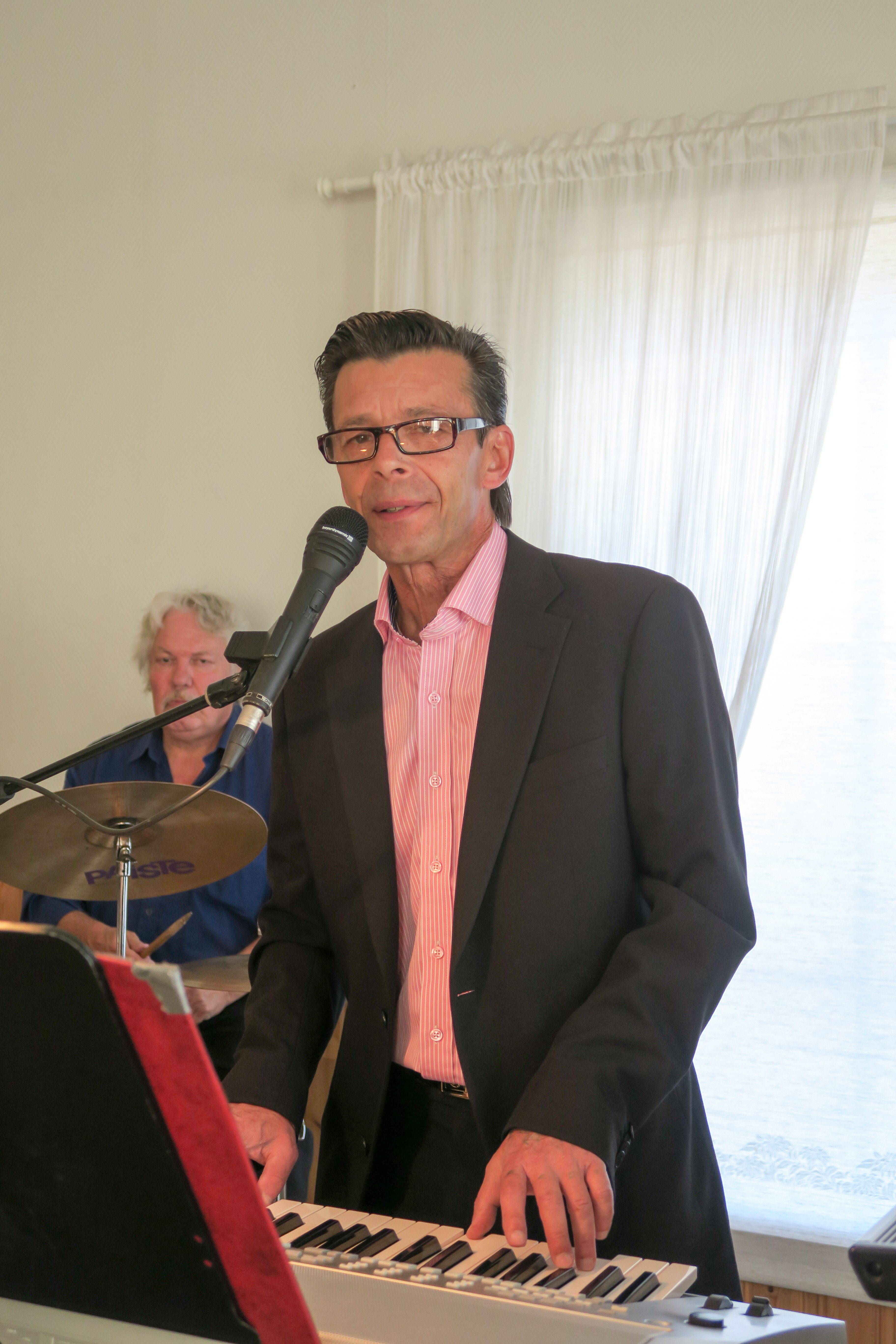 Pepe Enroth